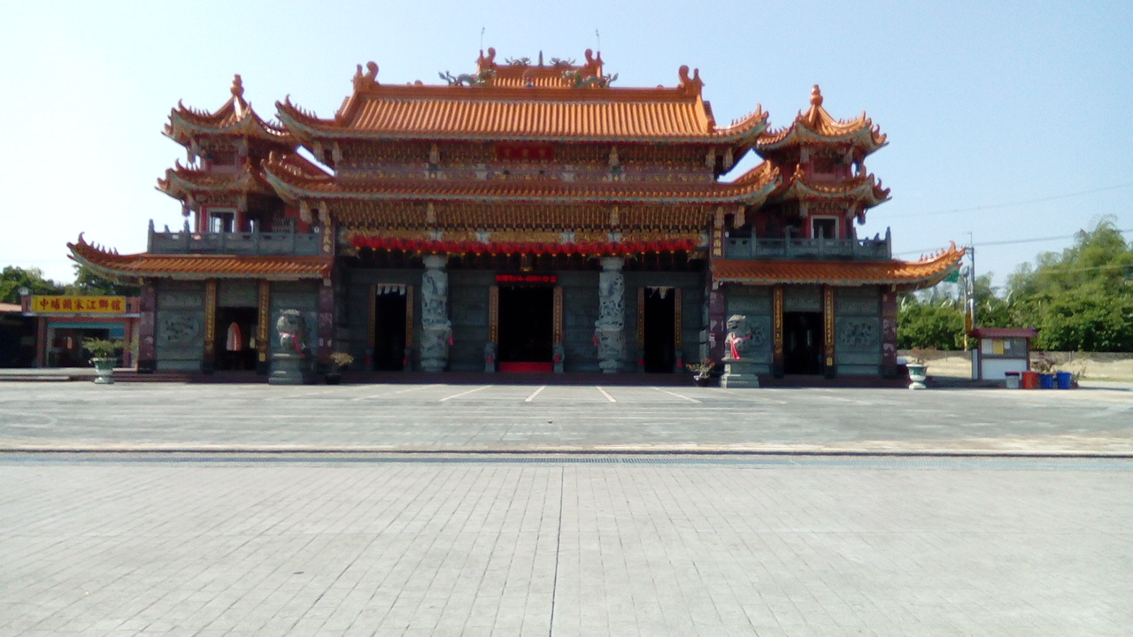 位於觀亭里 台3線旁